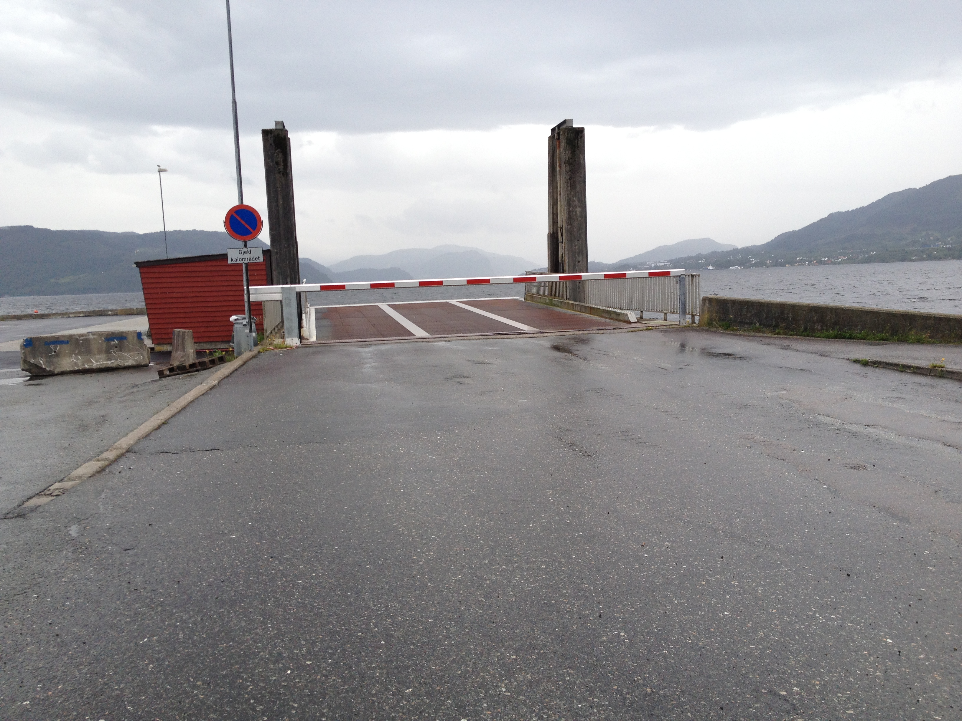 Knarvik ferjekai, august 2013.